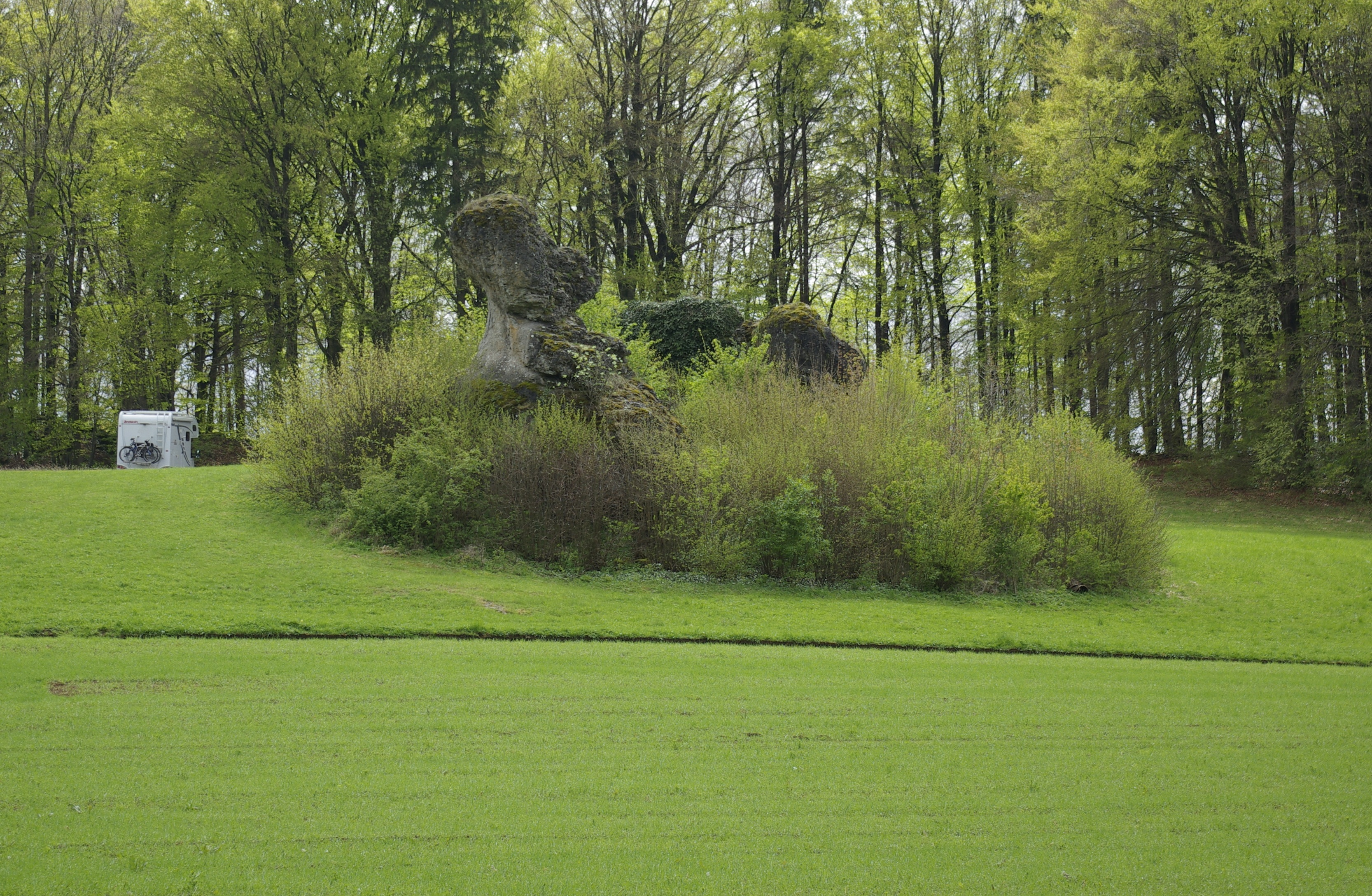 Blick auf den Zschokkefelsen im Felsengarten Sanspareil